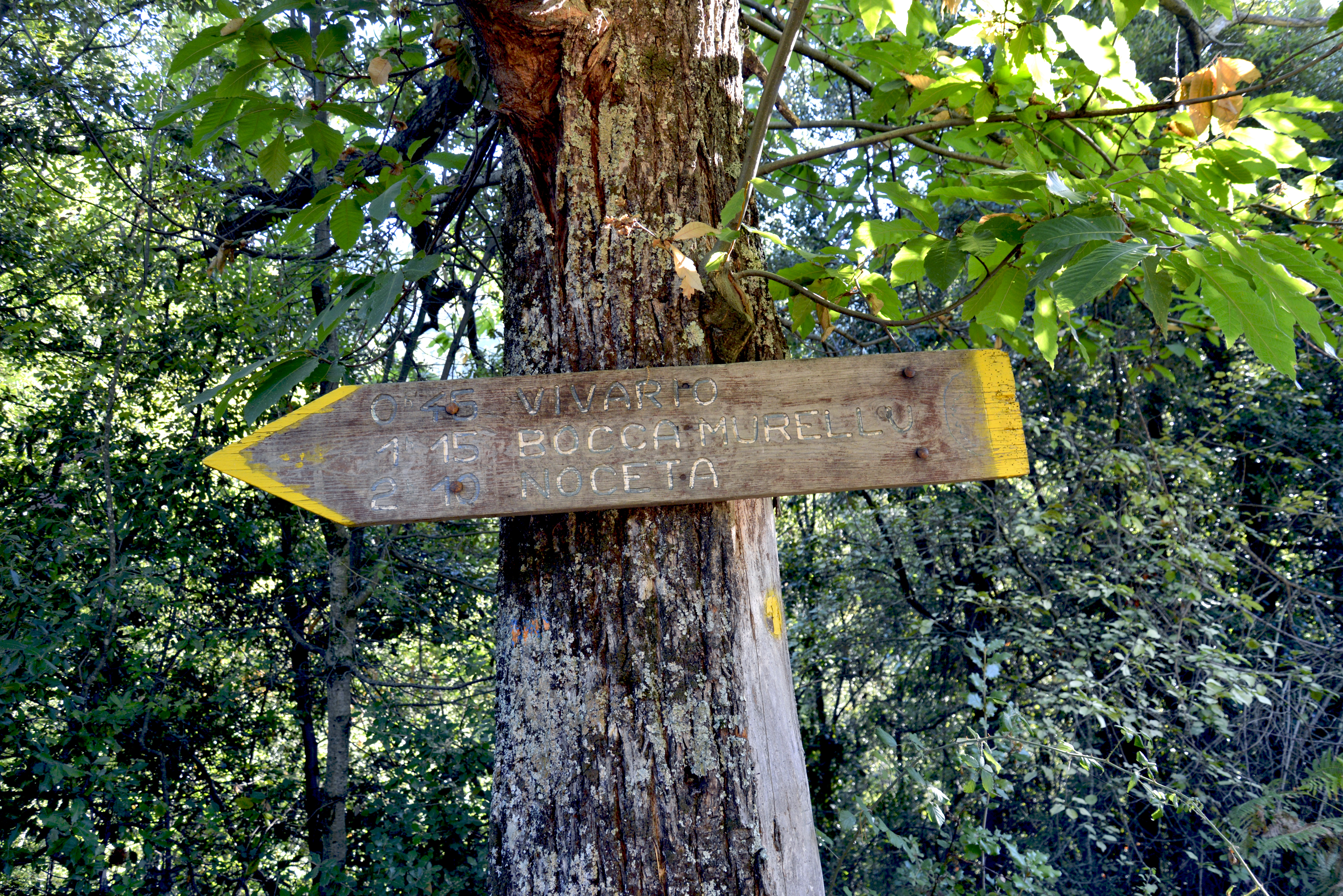 Muracciole, Centre Corse (Haute-Corse) - Panneau du sentier Mare a Mare nord variante à Arca